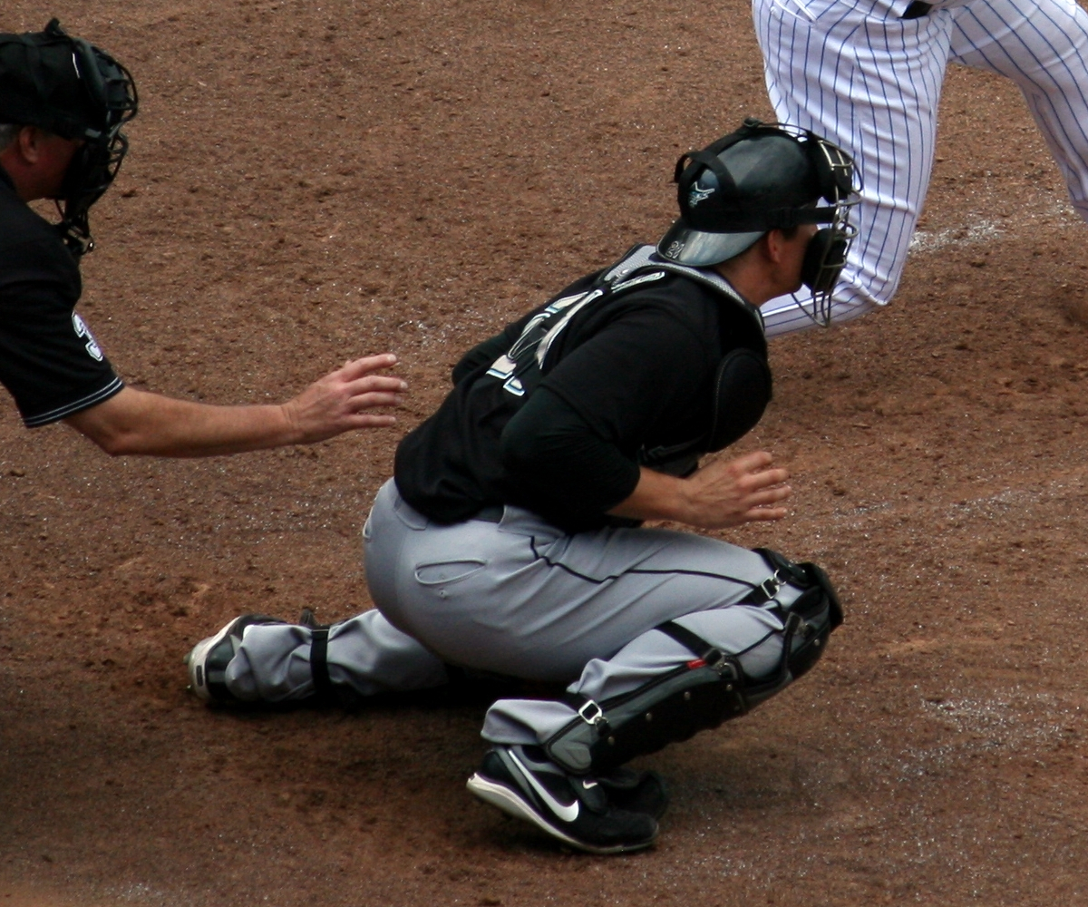 John Baker